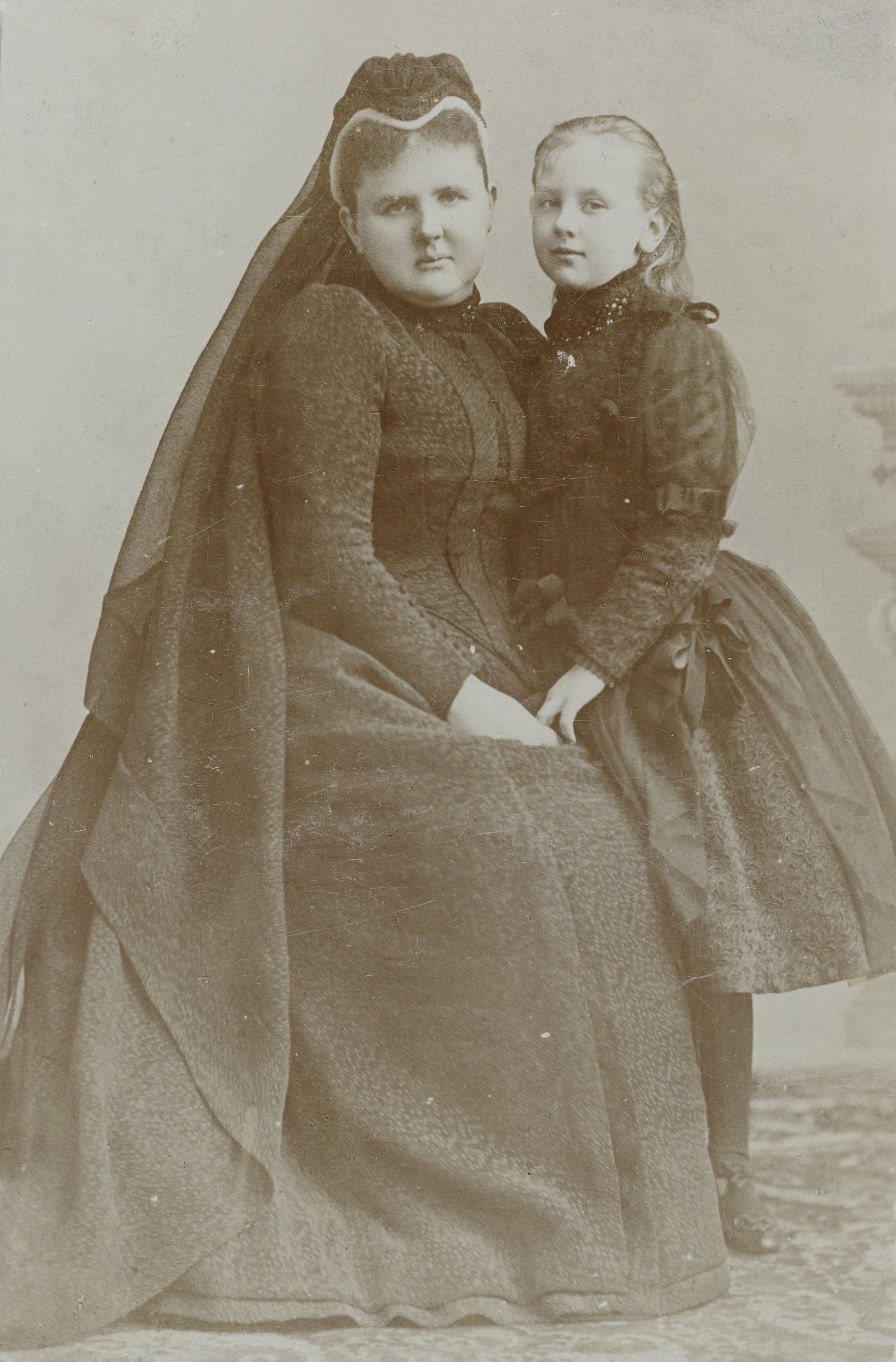 Portret van Emma, koningin-regentes der Nederlanden, en prinses Wilhelmina